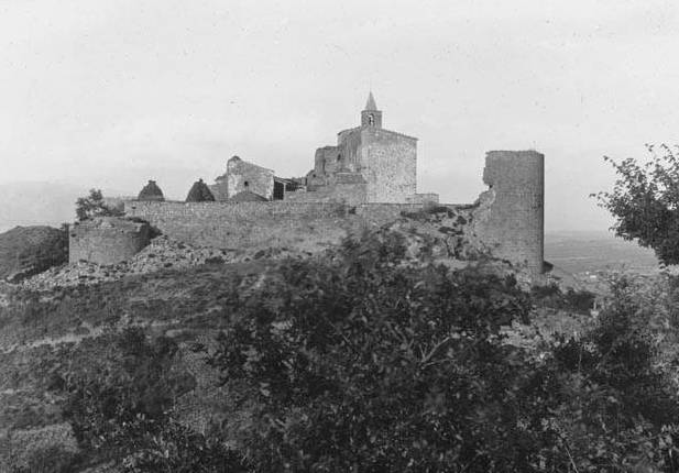 Imatge